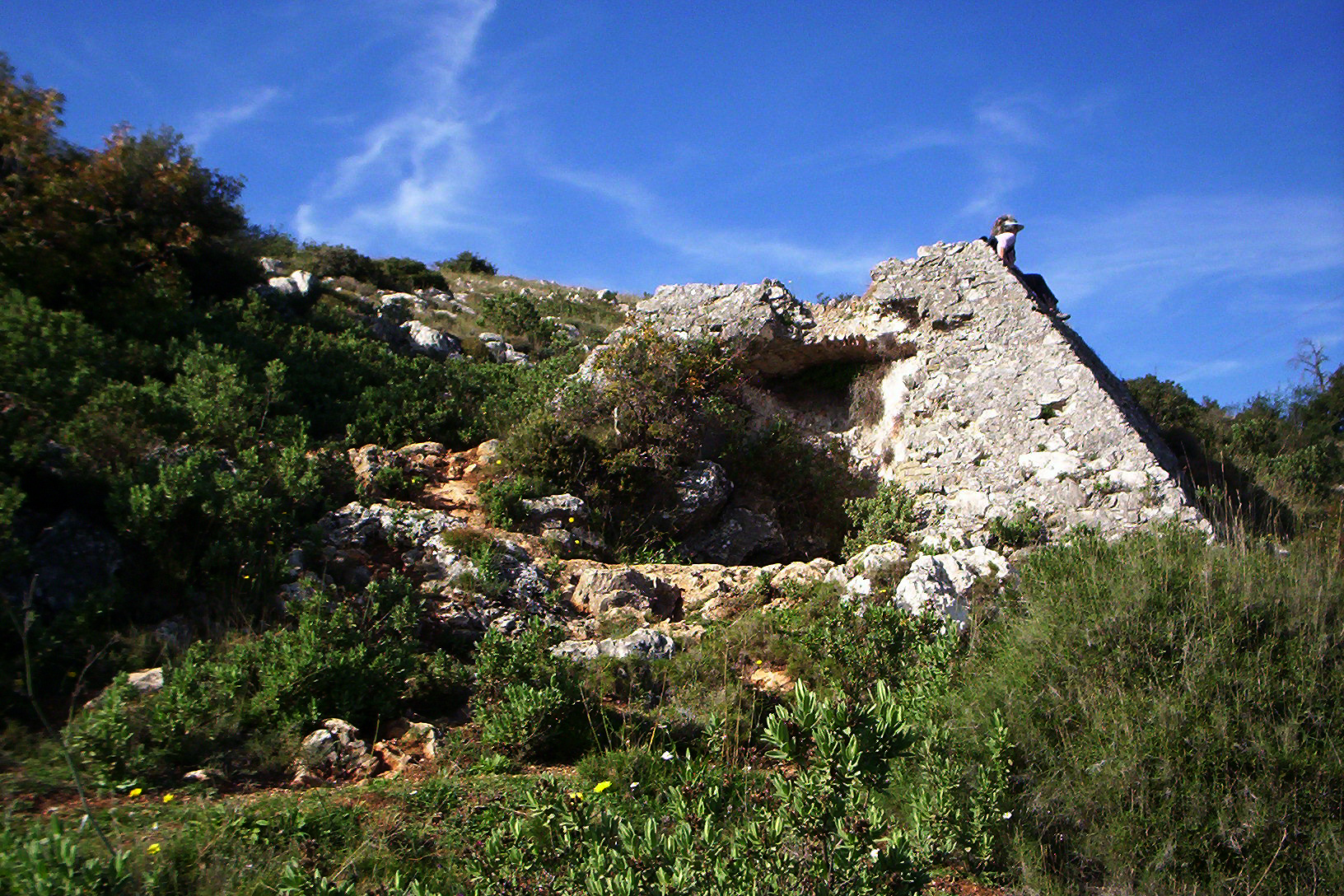 La pyramide de Falicon, automne 2006